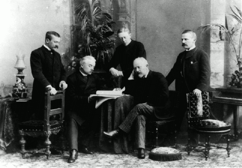 Ritratti da sinistra a destra: Anatoly Tchaikovsky, Nikolay Tchaikovsky, Ippolit Tchaikovsky, Pëtr Il'ič Čajkovskij e Modest Tchaikovsky. (San Pietroburgo)